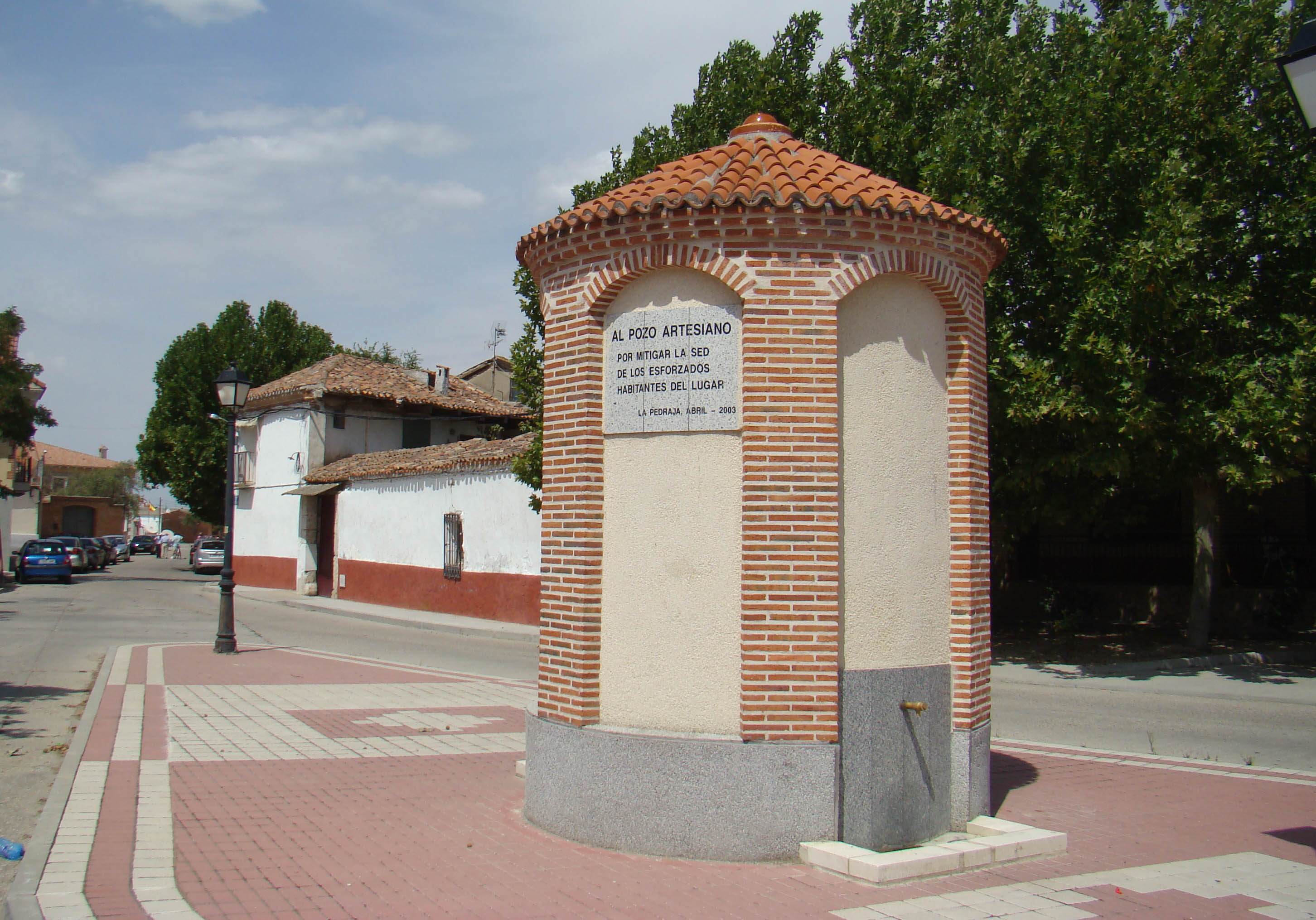 La Pedraja de Portillo en la provincia de Valladolid (España). Homenaje al pozo artesiano.